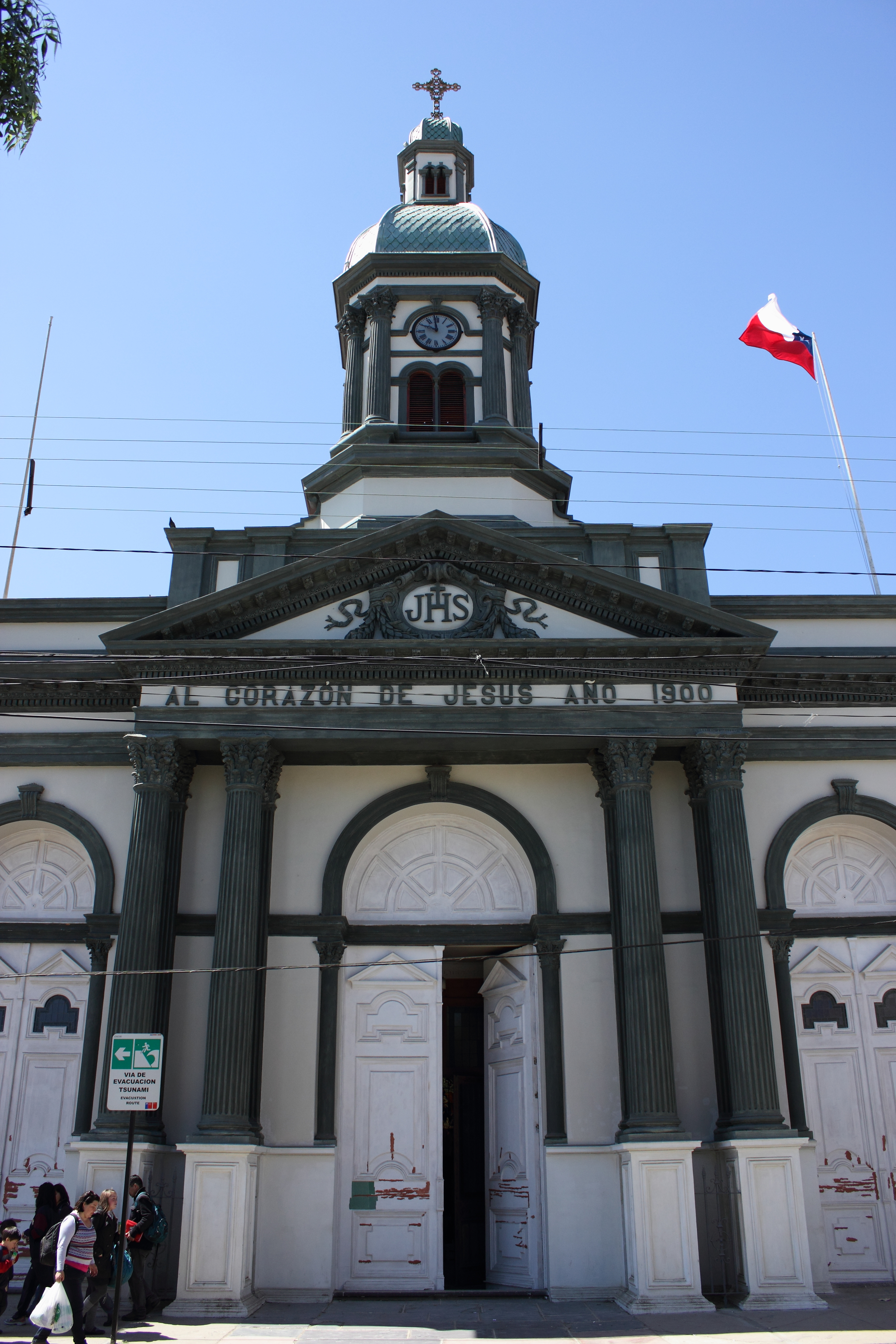 Iglesia La Compañía de Jesús This is a photo of a national monument in Chile: 582